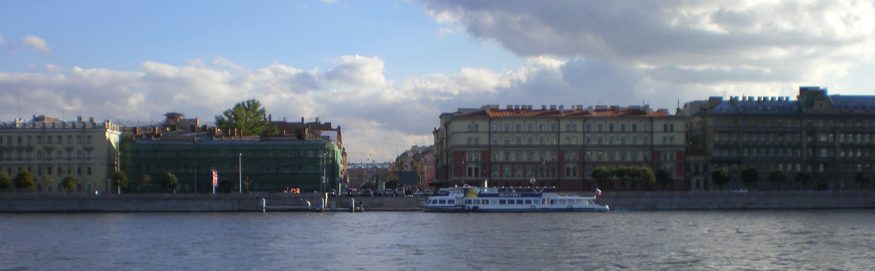 Набережная Робеспьера (дома 16-22) и Проспект Чернышевского, спуск к Неве